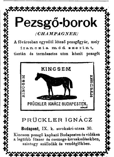 "Prückler Ignác Magyarország első rum-, likőr- és pezsgőgyára" - Reklám a Kincsem nevű pezsgőről a Vadász- és Versenylapon.